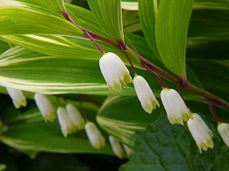 Polygonatum odoratum Angular Solomon's Seal